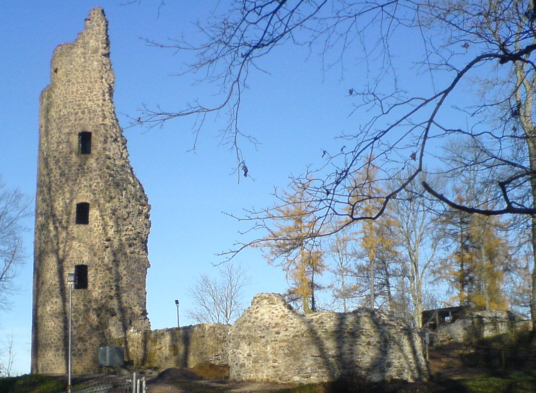 Die Burgruine Dagstuhl im saarländischen Wadern.